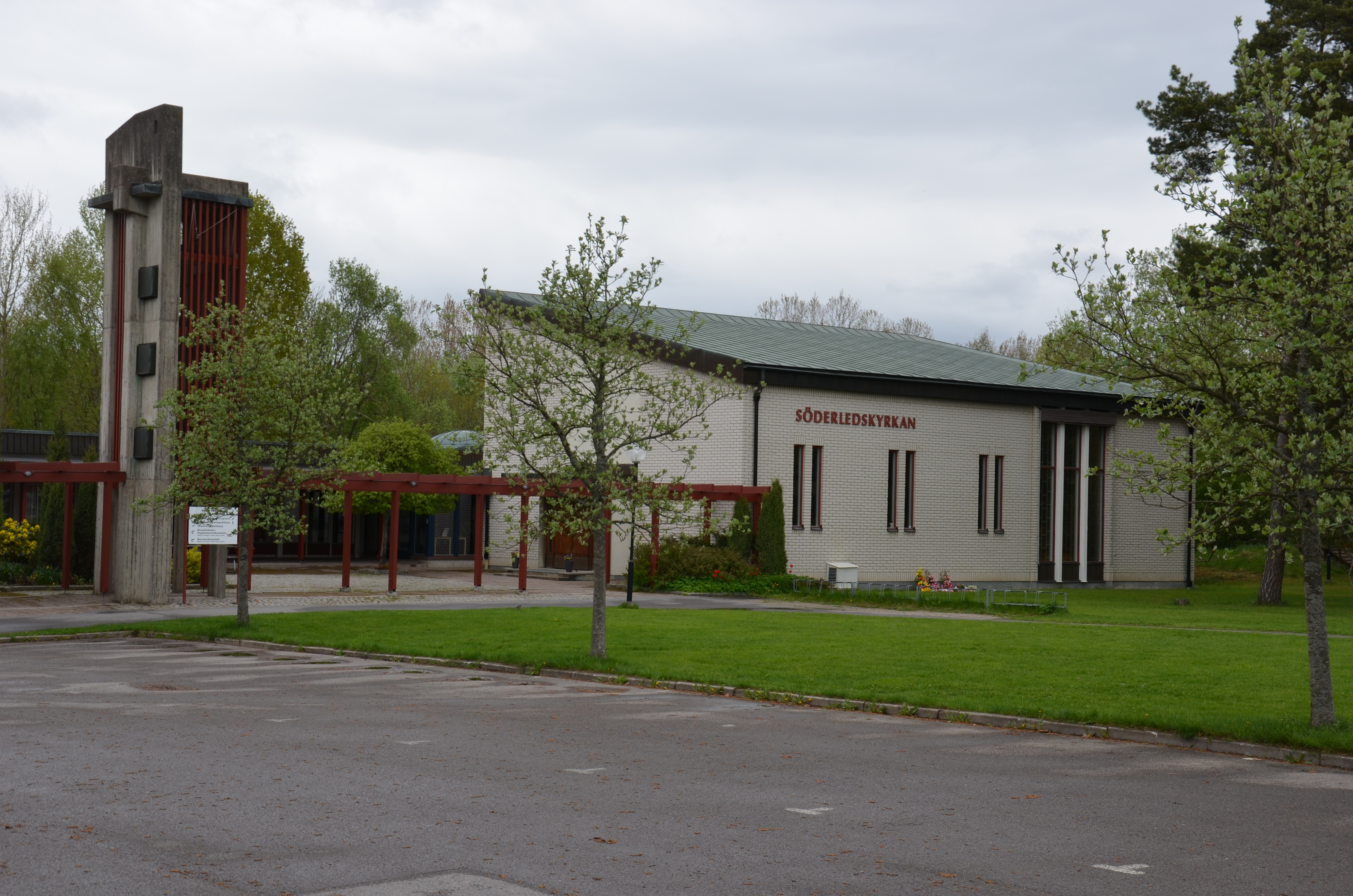 Söderledskyrkan in Norrköping